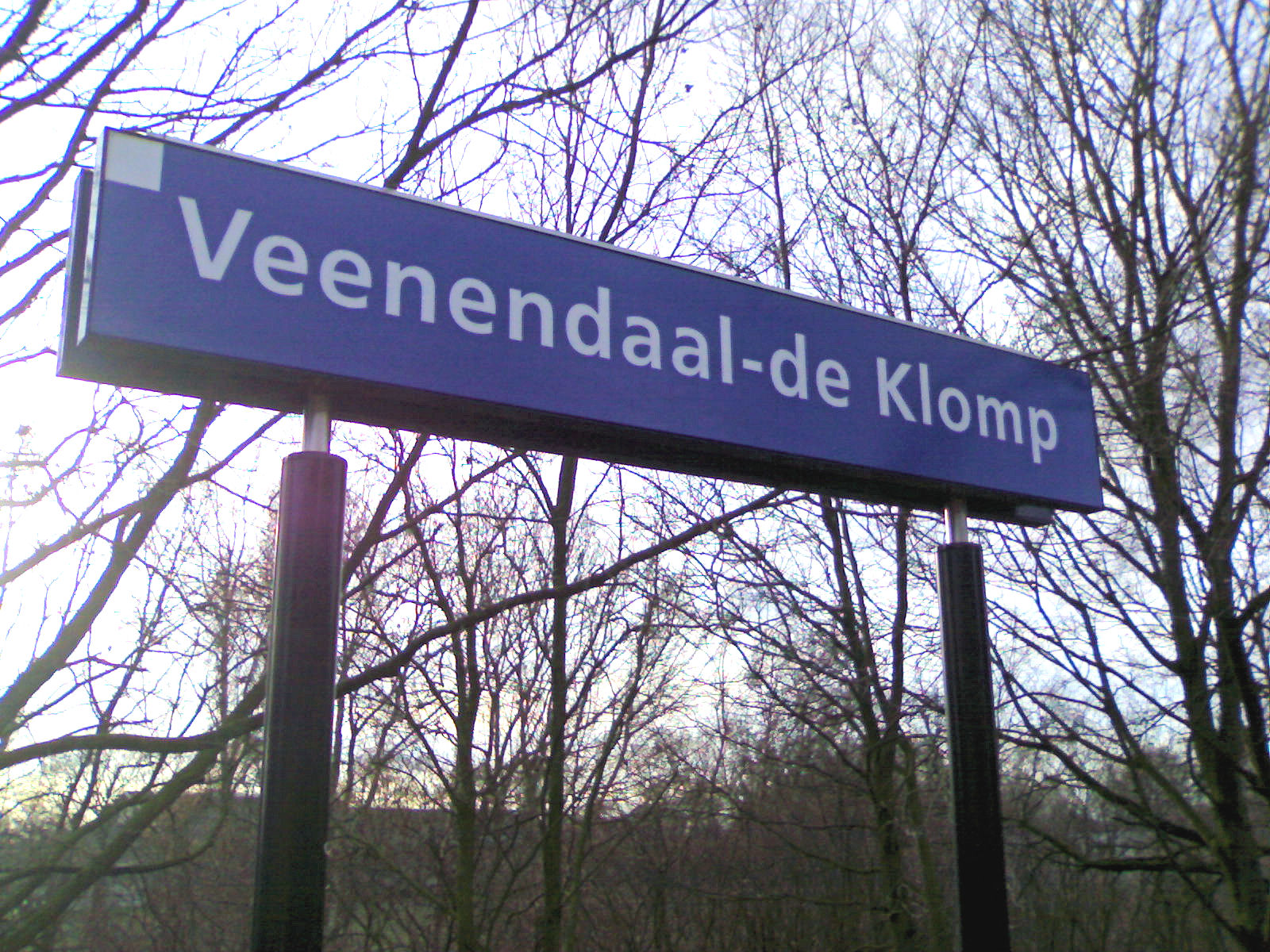 Eigen foto